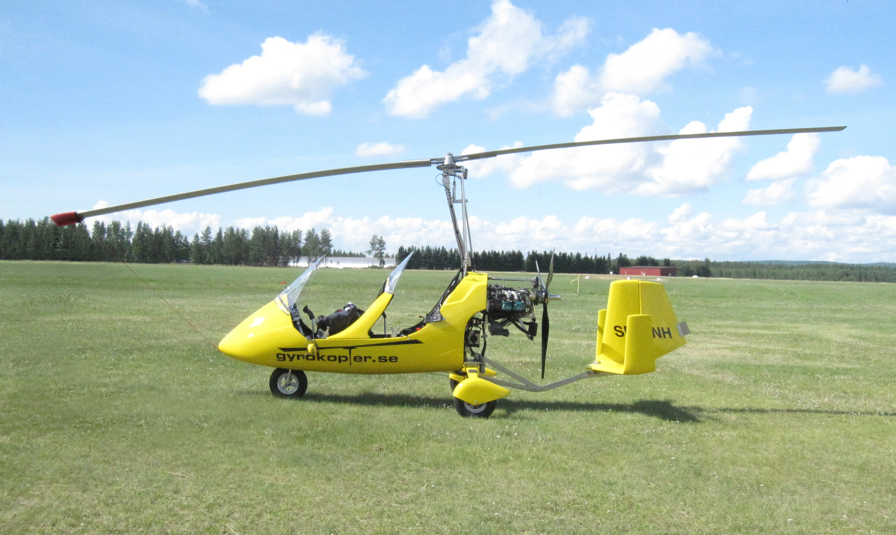 Gyrokopter MTO-Sport